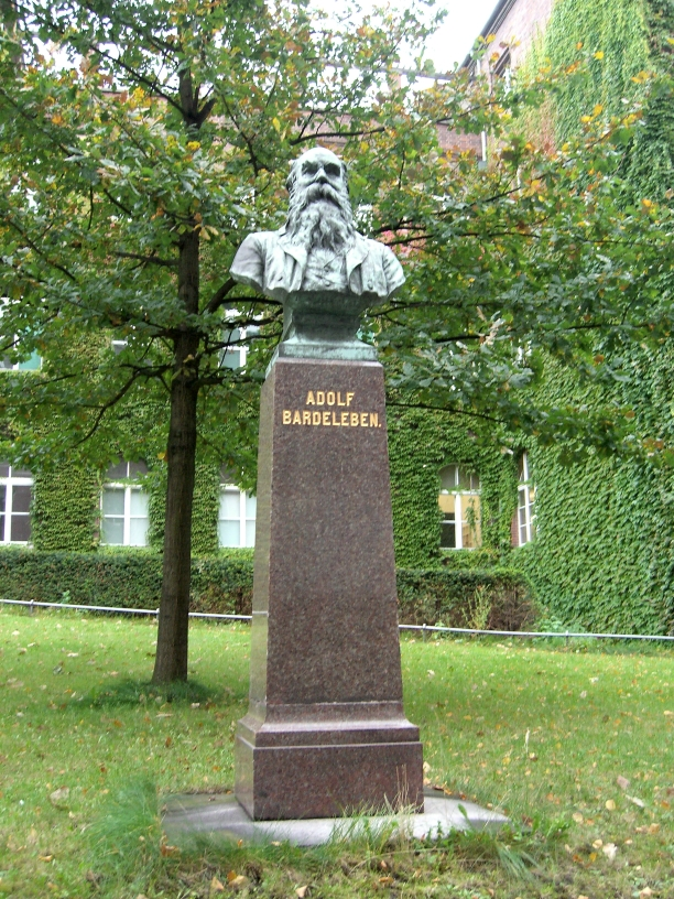 Berlin Denkmal Heinrich Adolf von Bardeleben von Martin Wolff